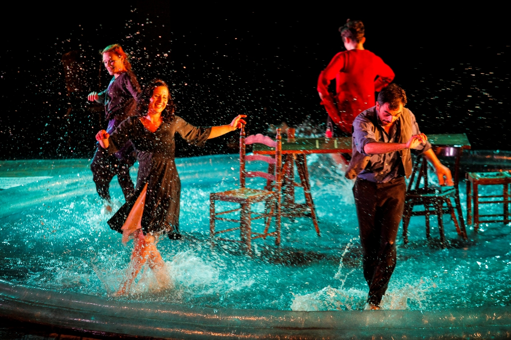 မြန်မာဘာသာ: Lazurd, de Senza Tempo, a Sismògraf 2014